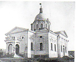 Предтеченский Собор в городе Зарайске Зарайского уезда Рязанской губернии (ныне - Зарайский район Московской области), 1930 год. Фото из частного архива Кутаева Владимира Степановича